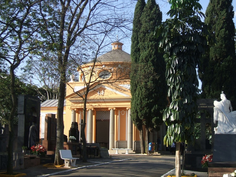 Vista da capela do Cemitério São Paulo, no bairro de Pinheiros, São Paulo, Brasil.